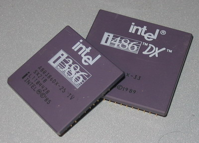 intel 386,486. מעבדי 486 ו386 של he:אינטל מהקולקציה הפרטית שלי. צולם בעזרת מצלמת Canon PowerShot A60. התמונה חופשית לשימושו של כל אחד. GNU